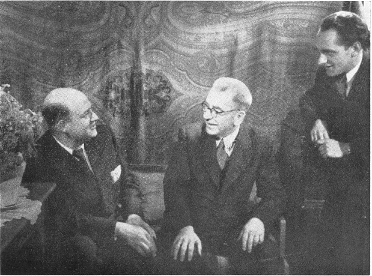 Maxian,Kurz,Jilek